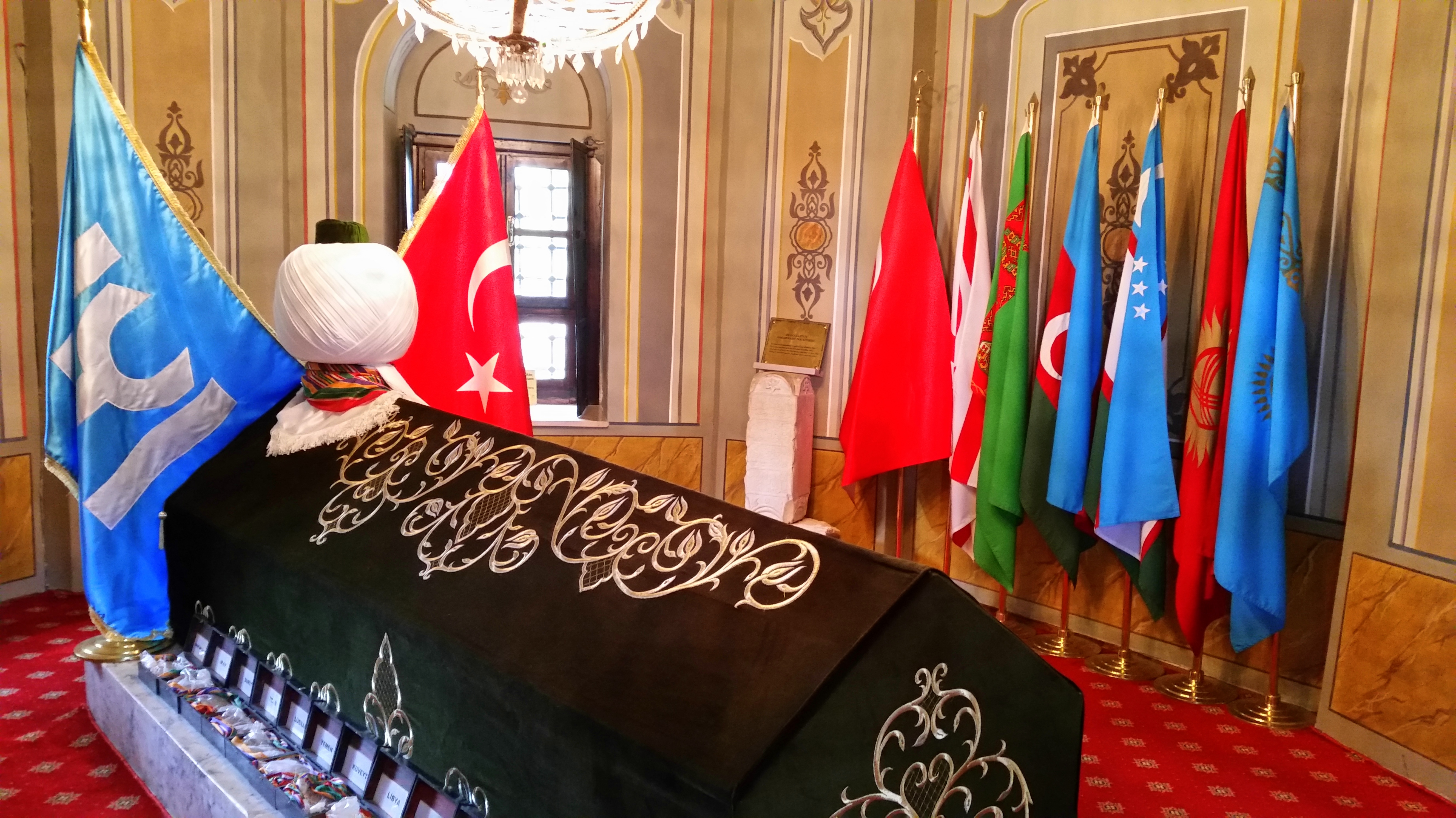 Ertuğrul Gazi'nin Söğüt, Bilecik'te bulunan türbesi.